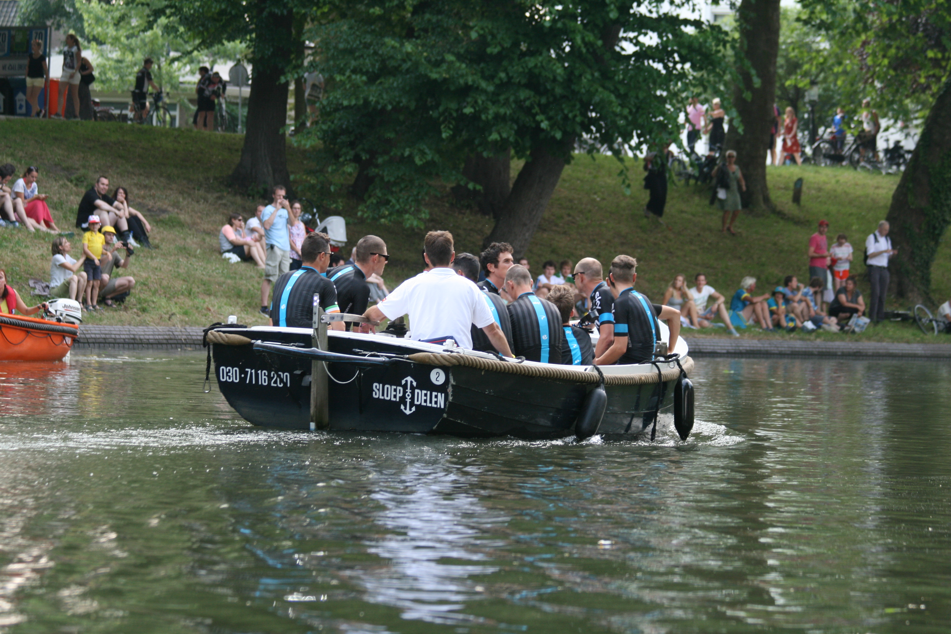 ploegenpresentatie Tour de France 2015 Utrecht